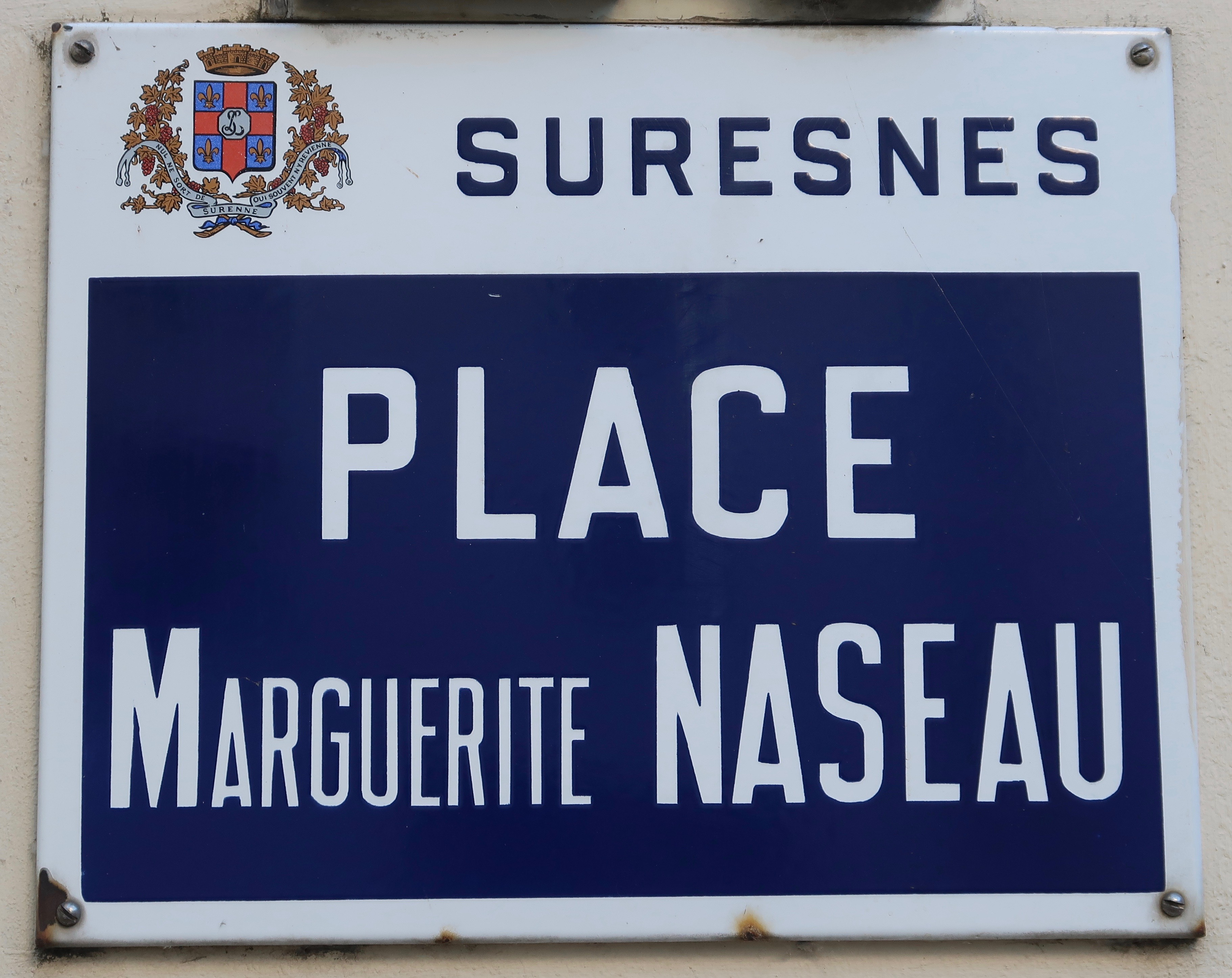 Plaque de la place Marguerite-Naseau à Suresnes (Hauts-de-Seine).